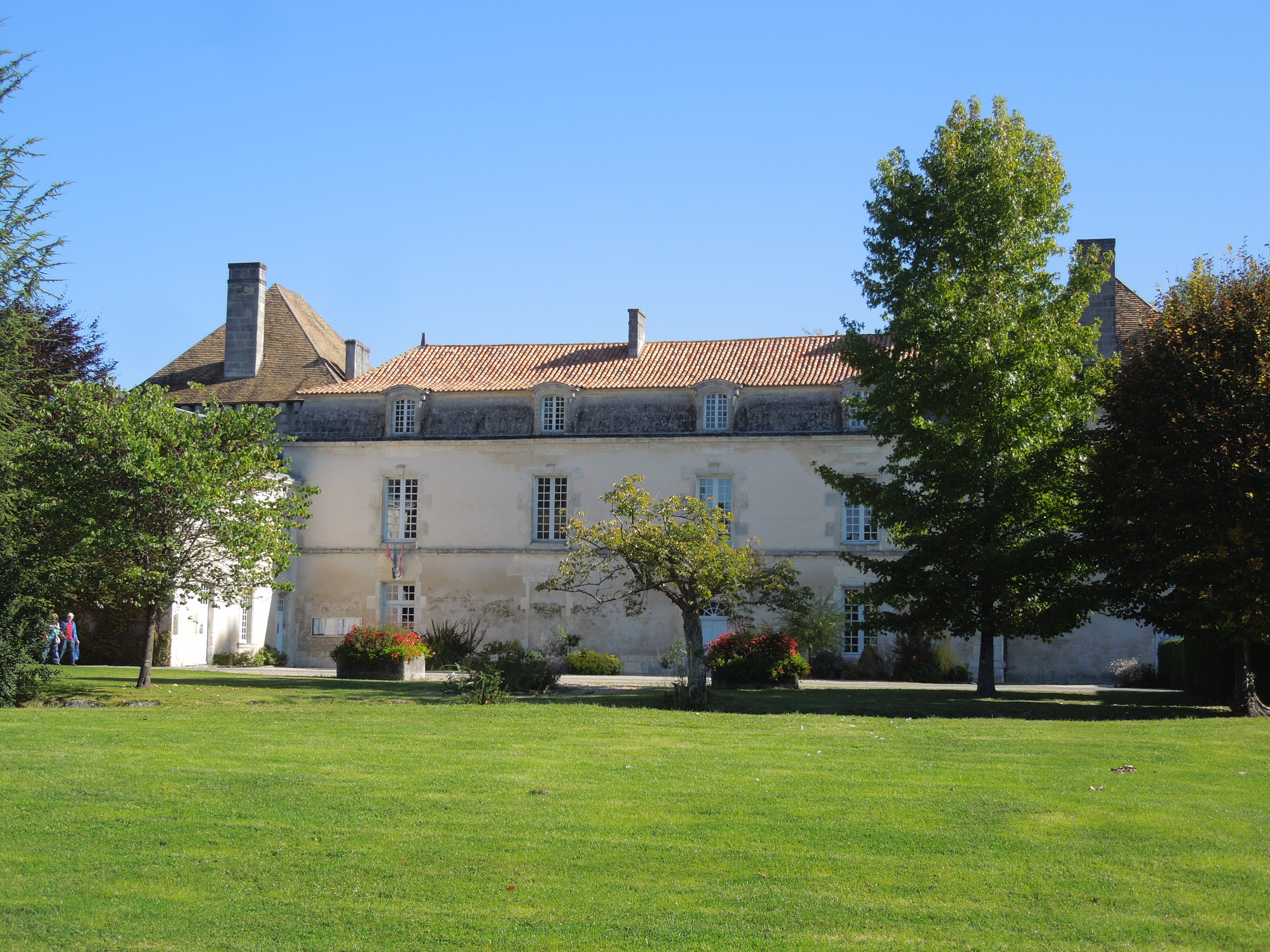 Das Château de Lignières in Lignières-Sonneville, Westseite (im Château befinden sich heute die Mairie und der Gemeindesaal)